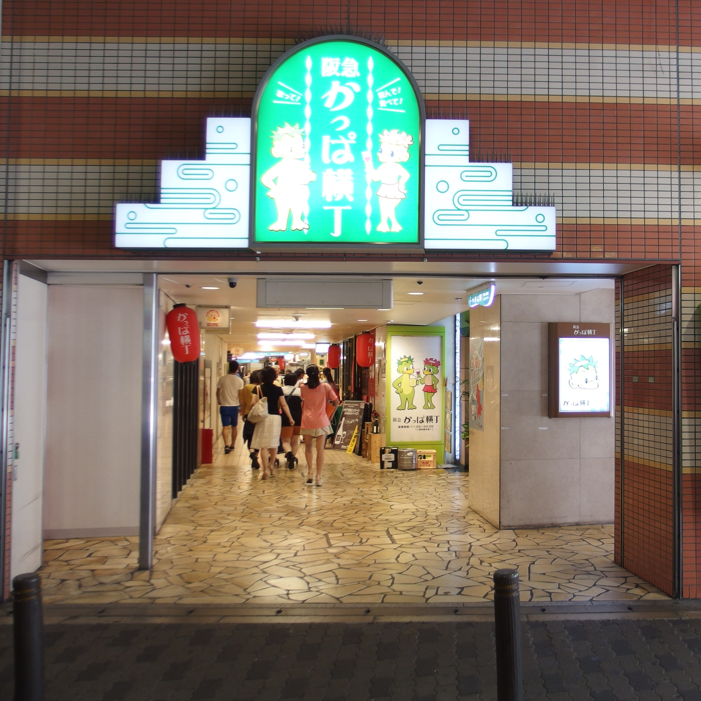 阪急かっぱ横丁, 大阪府大阪市